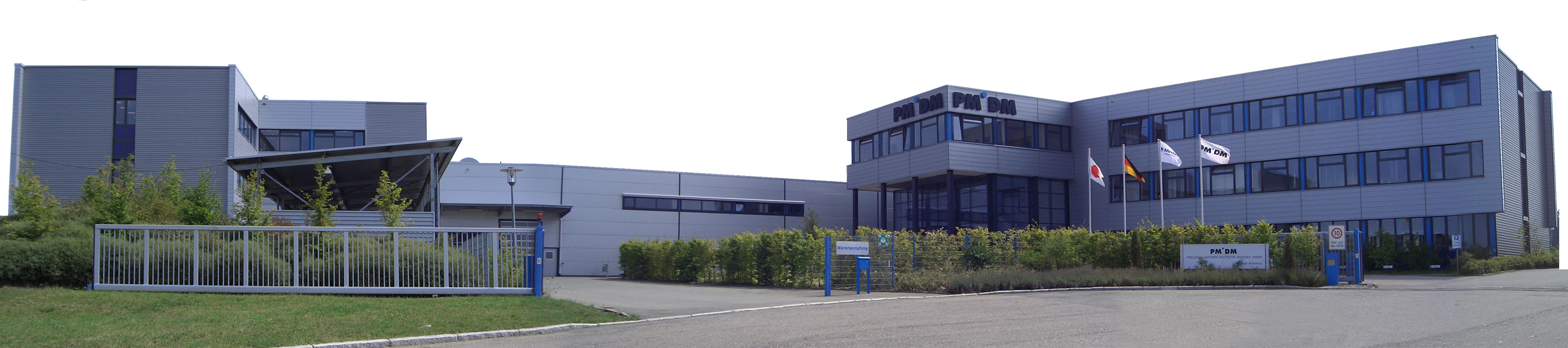 Entwicklungszentrum Villingen-Schwenningen